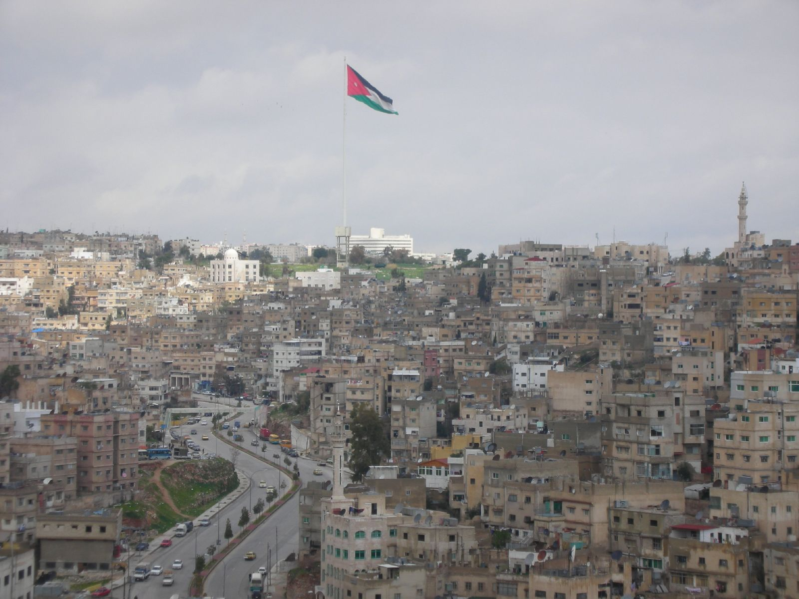 World's biggest flagpole in Amman, Jordan